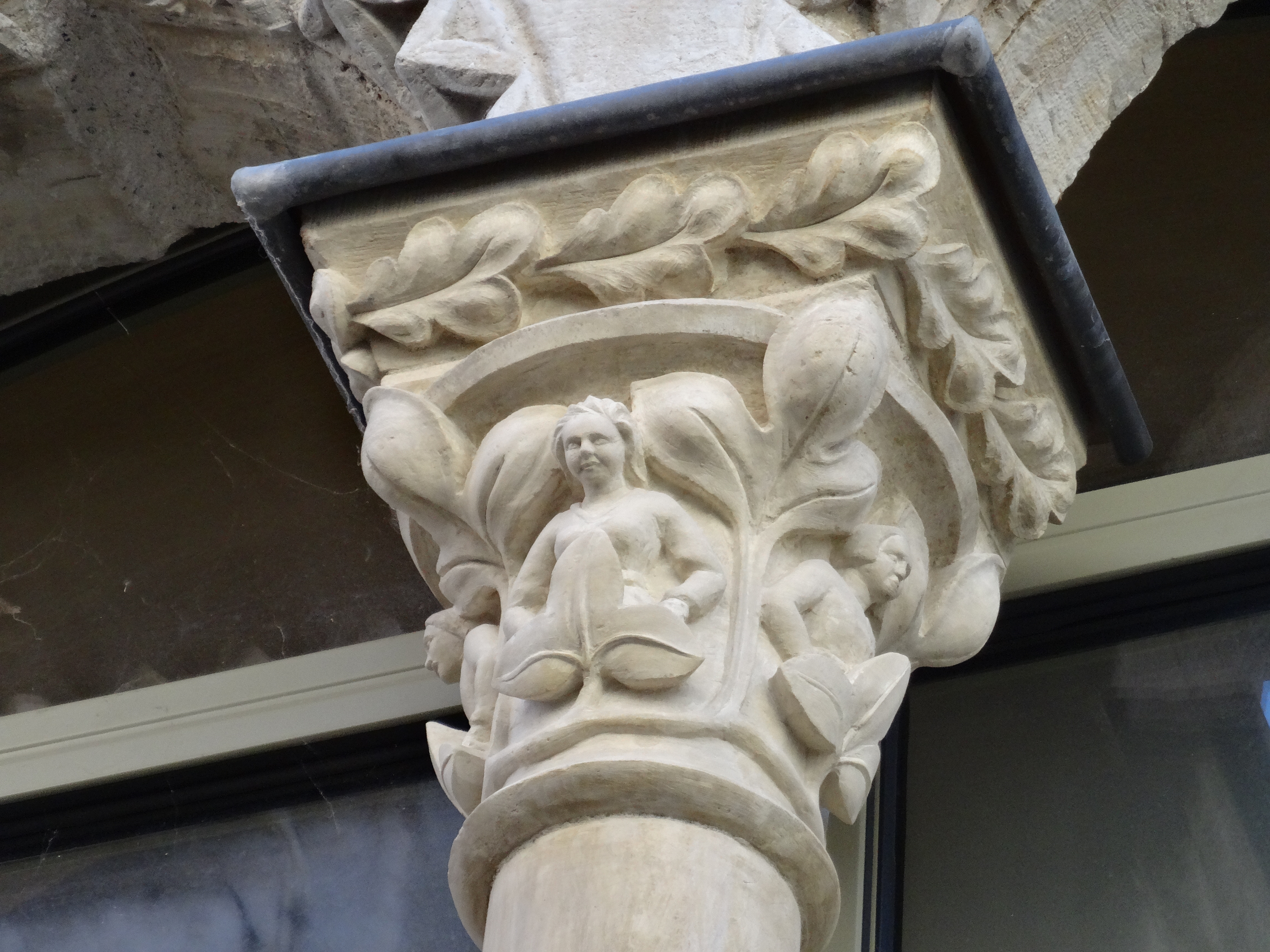 Villemagne-l'Argentière (Hérault) - Hôtel des monnaies - chapiteau gothique 13° siècle remplacé.